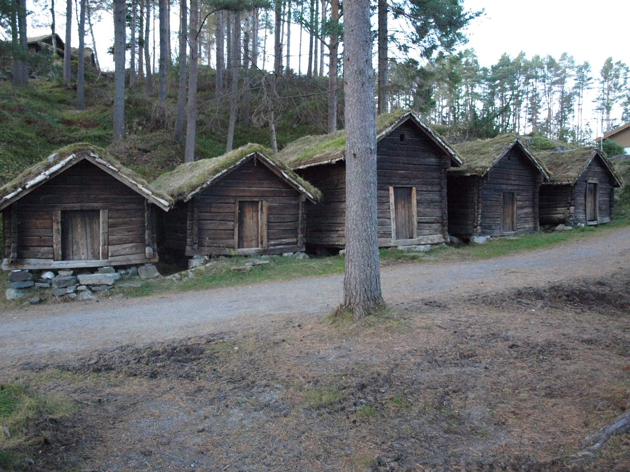 Kyrkjebuer frå Stranda, no på Sunnmøre Museum